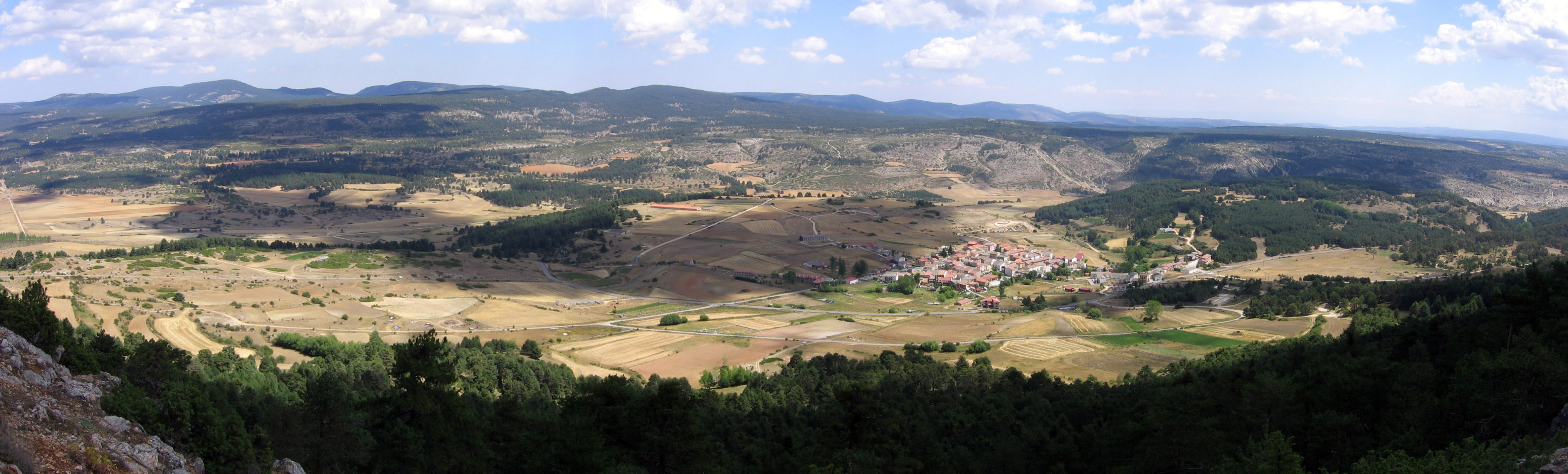 Sierra de Albarracín.